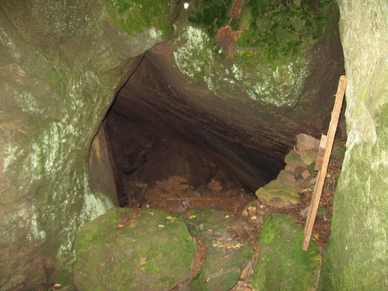 Cueva donde vivió Santa Teodora en Sihla, Rumania